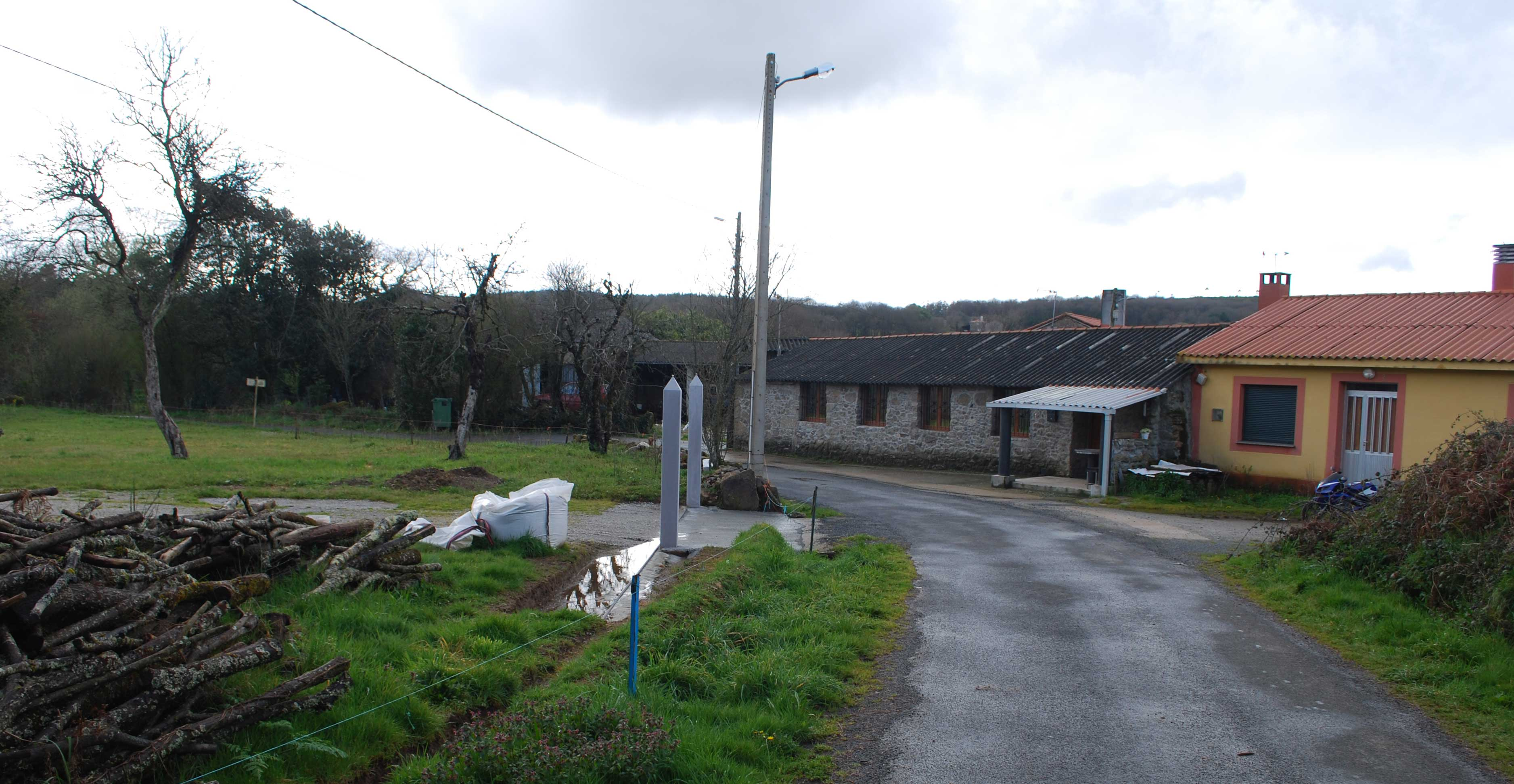 Vista de Estremil en Fisteus concello de Curtis A Coruña